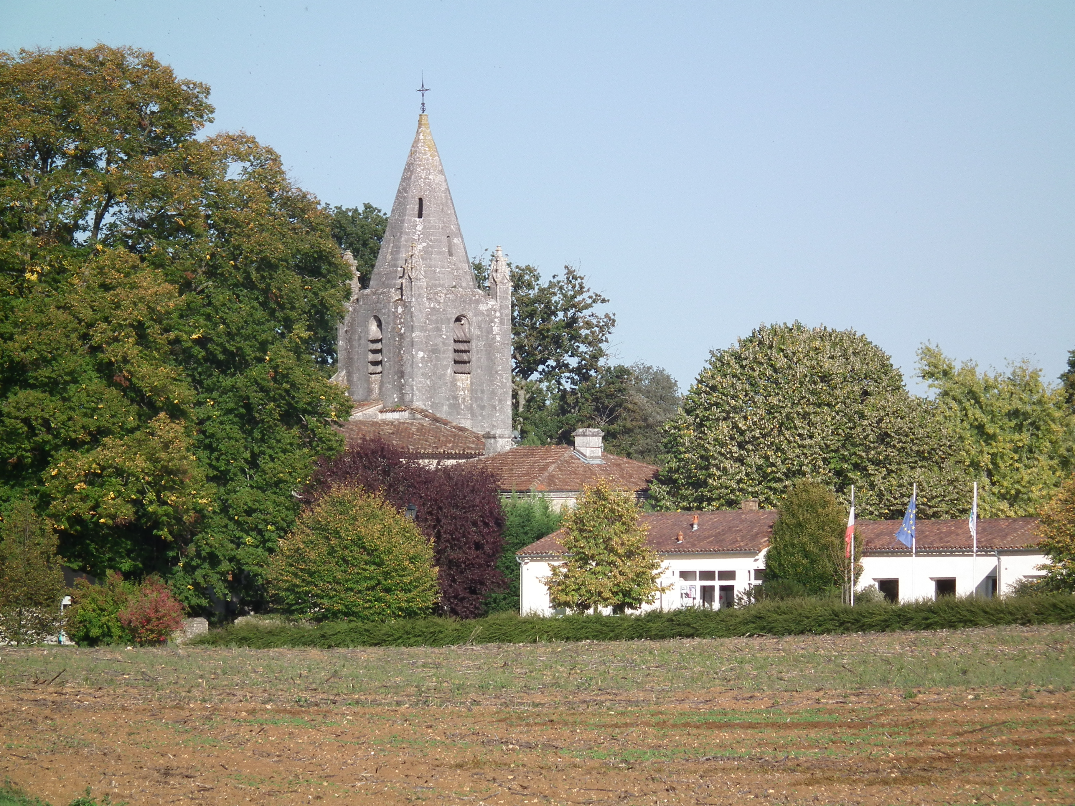 Vue du village du Douhet